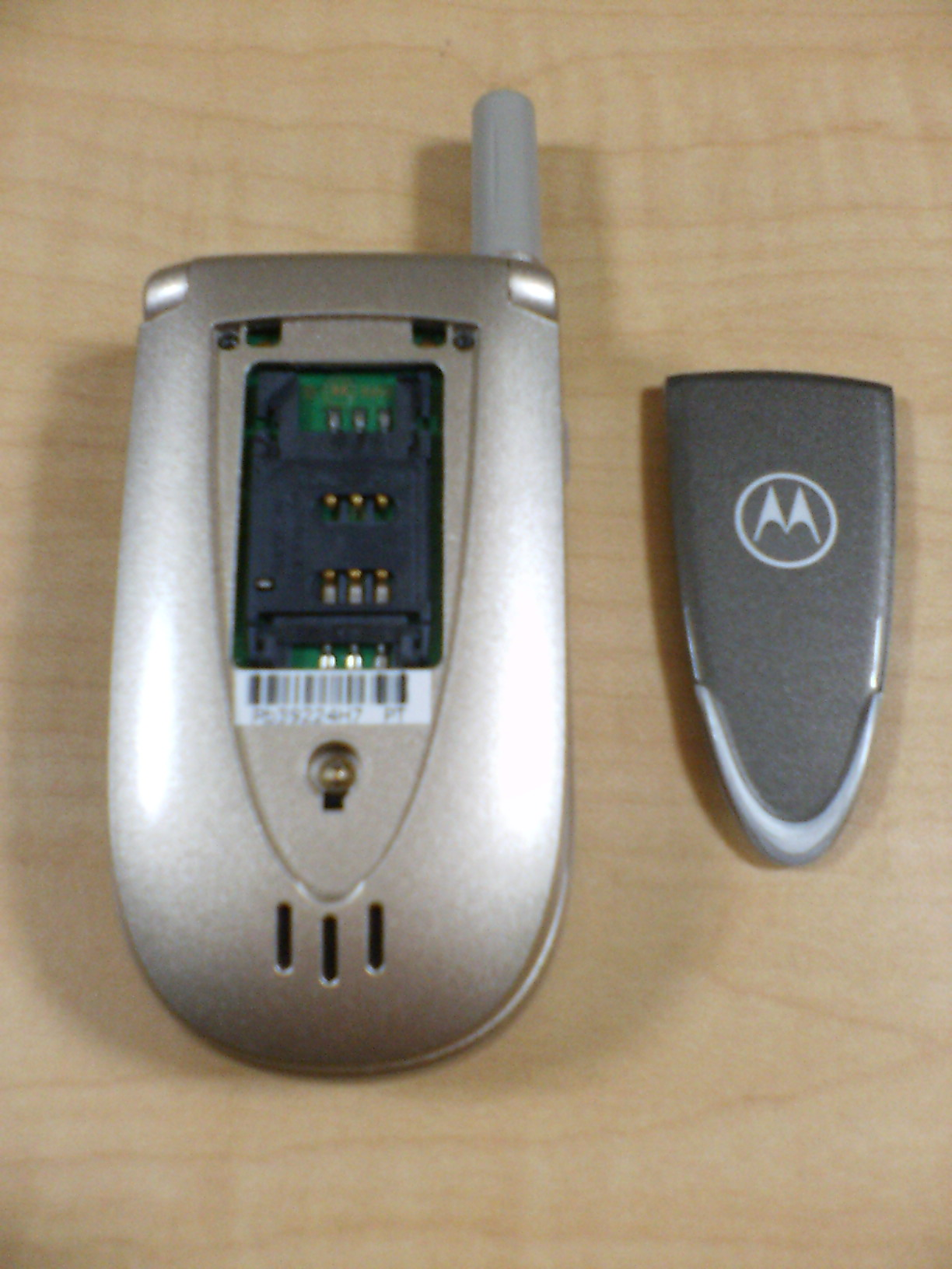 Motorola V66 mobile phone